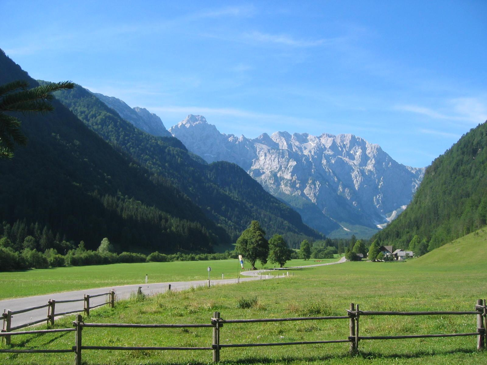 Logarska dolina, mountain valley in Slovenia (Kamniško-Savinjske Alpe)